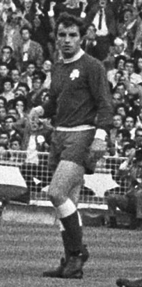 Ο ποδοσφαιριστής του Παναθηναϊκού Αριστείδης Καμάρας στον τελικό του Γουέμπλεϊ